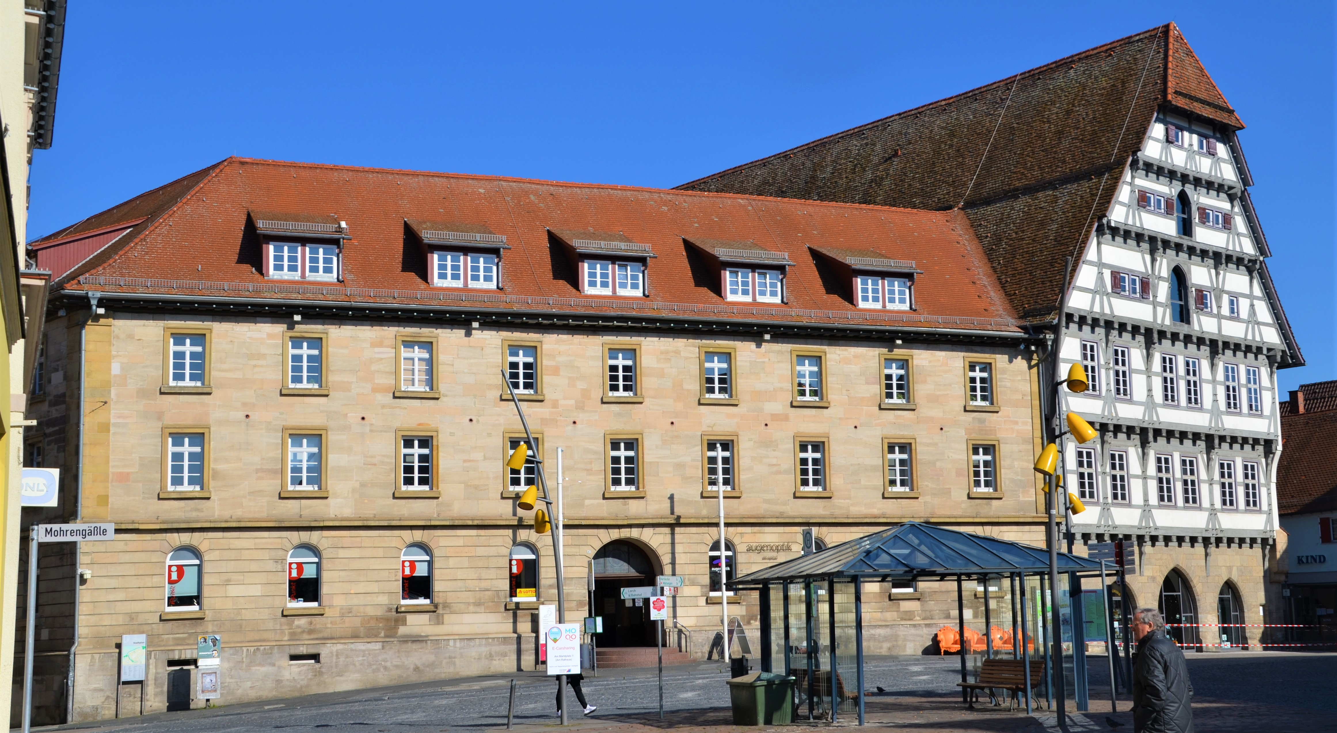 Spital, Ansicht Marktplatz, Schwäbisch Gmünd